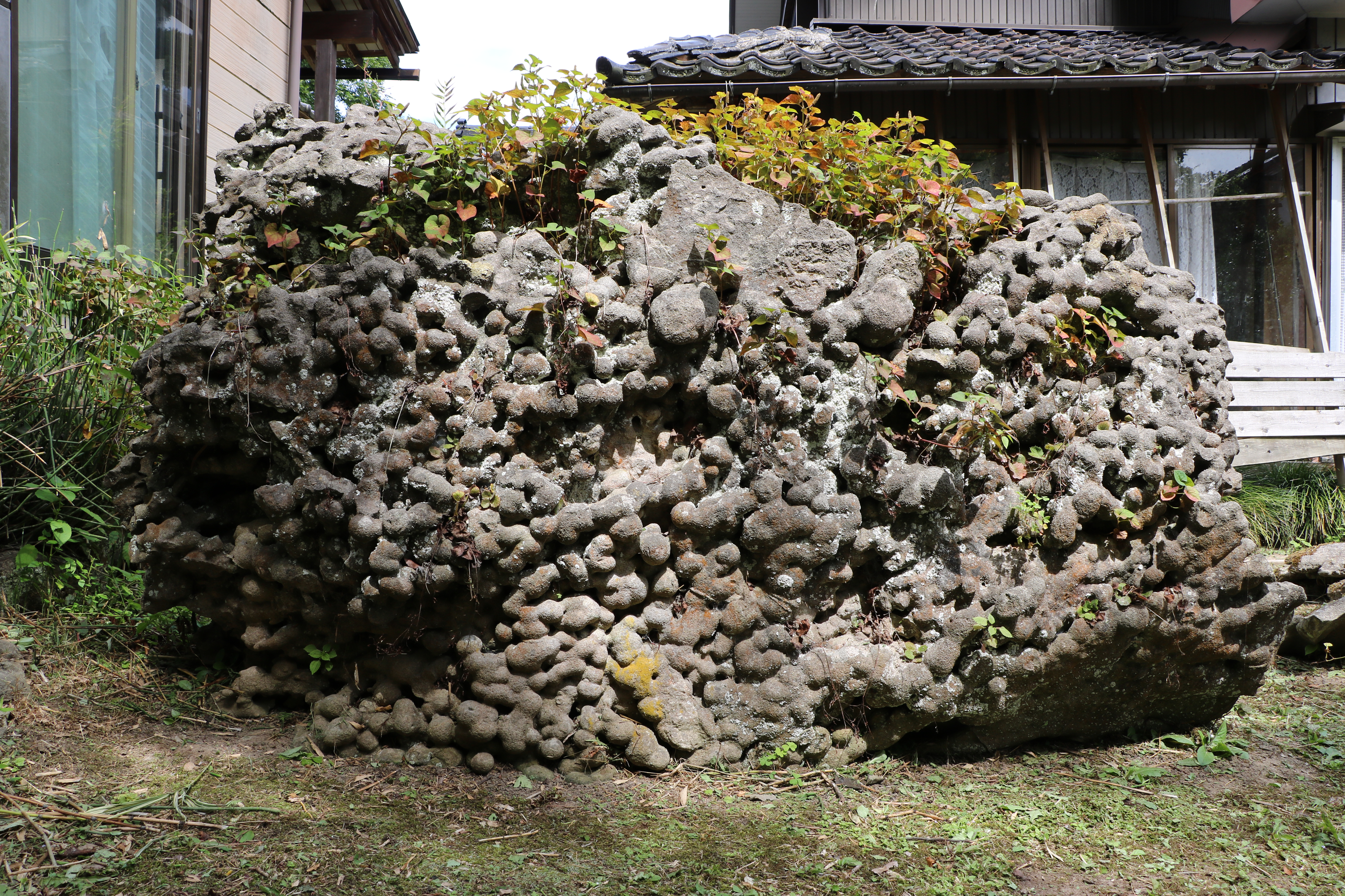 Ikubo no Hyotan-ishi. Stone nodules in natural monument of Japan. Himi,Toyama.